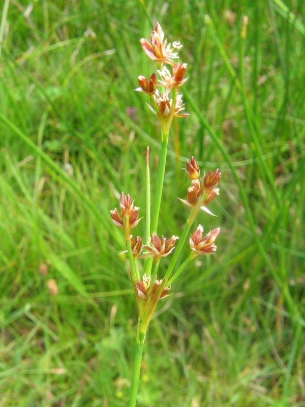 Glieder-Binse Juncus articulatus, Warnow-Wiesen bei Rostock